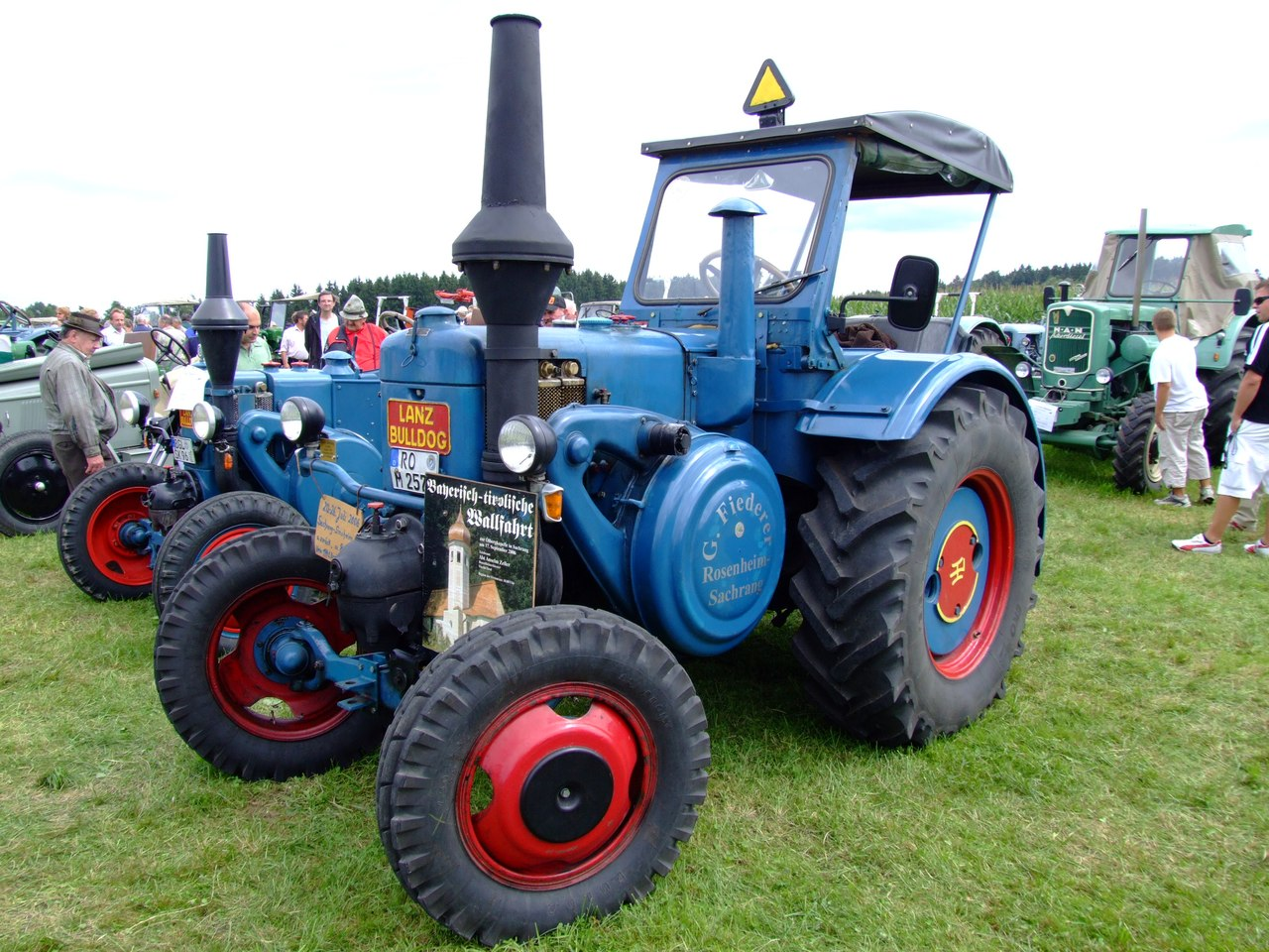 Lanz D 8506 mit 35 PS, Baujahr 1951, Einzylinder-Motor mit 10,3 Liter Hubraum